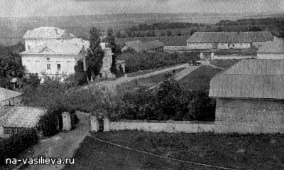 Фотография "барского дома" в Горожанке (Рамонский район, Воронежская область) в начале 20 века.